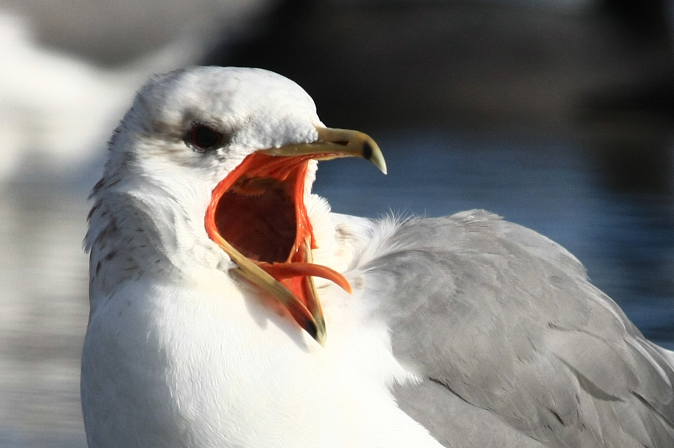 California gull, Larus californicus